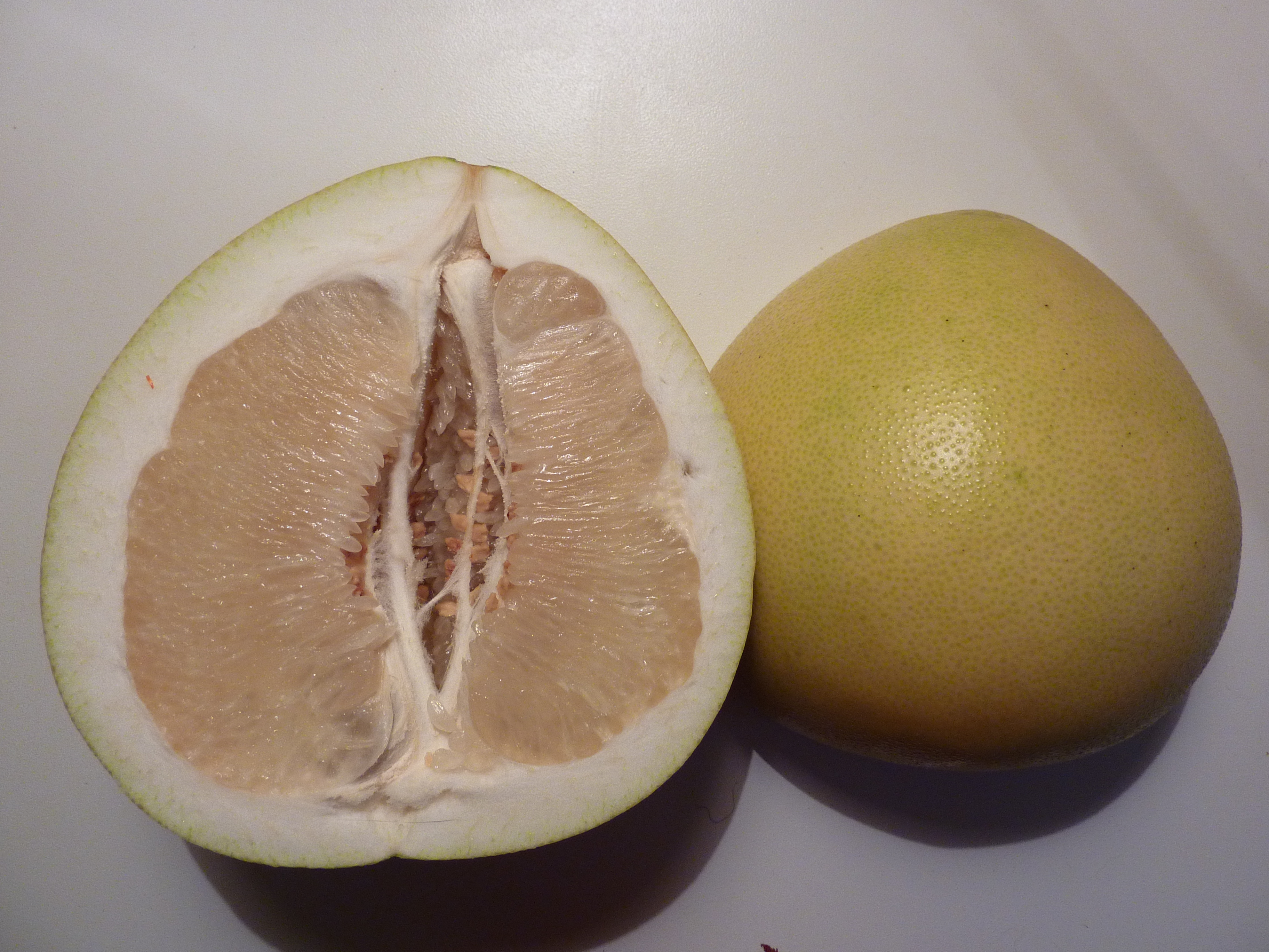 "Citrus maxima" var. 'Honey' - vue en coupe